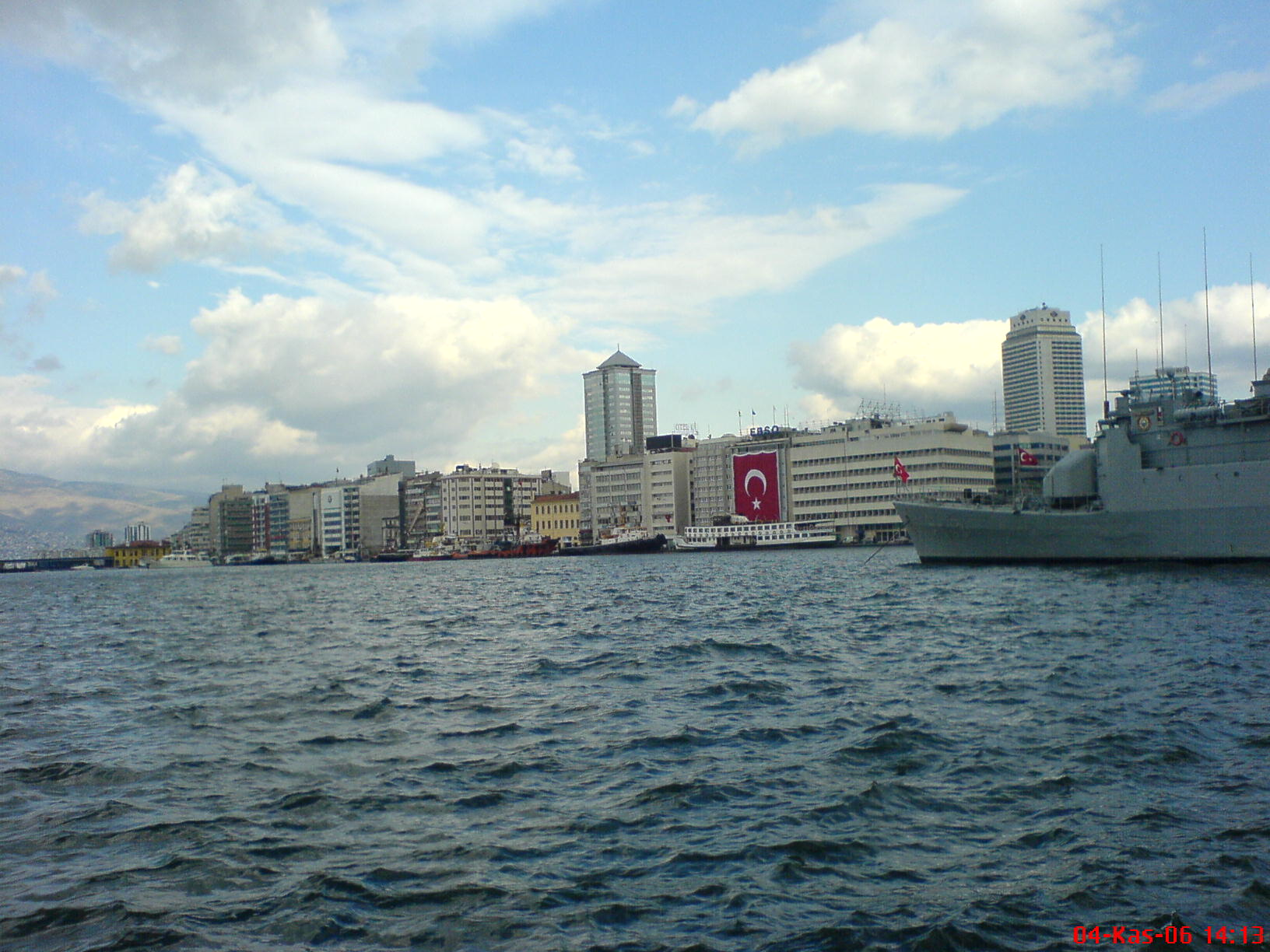 Konak pier den çekilmiş Pasaport görünümü Pasaport,İzmir as seen from Konak Pier